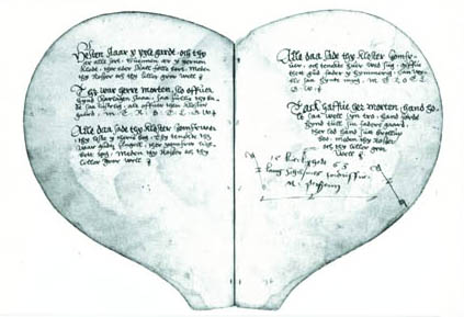 Billede af hjertebogen på den kongelige bibliotek.